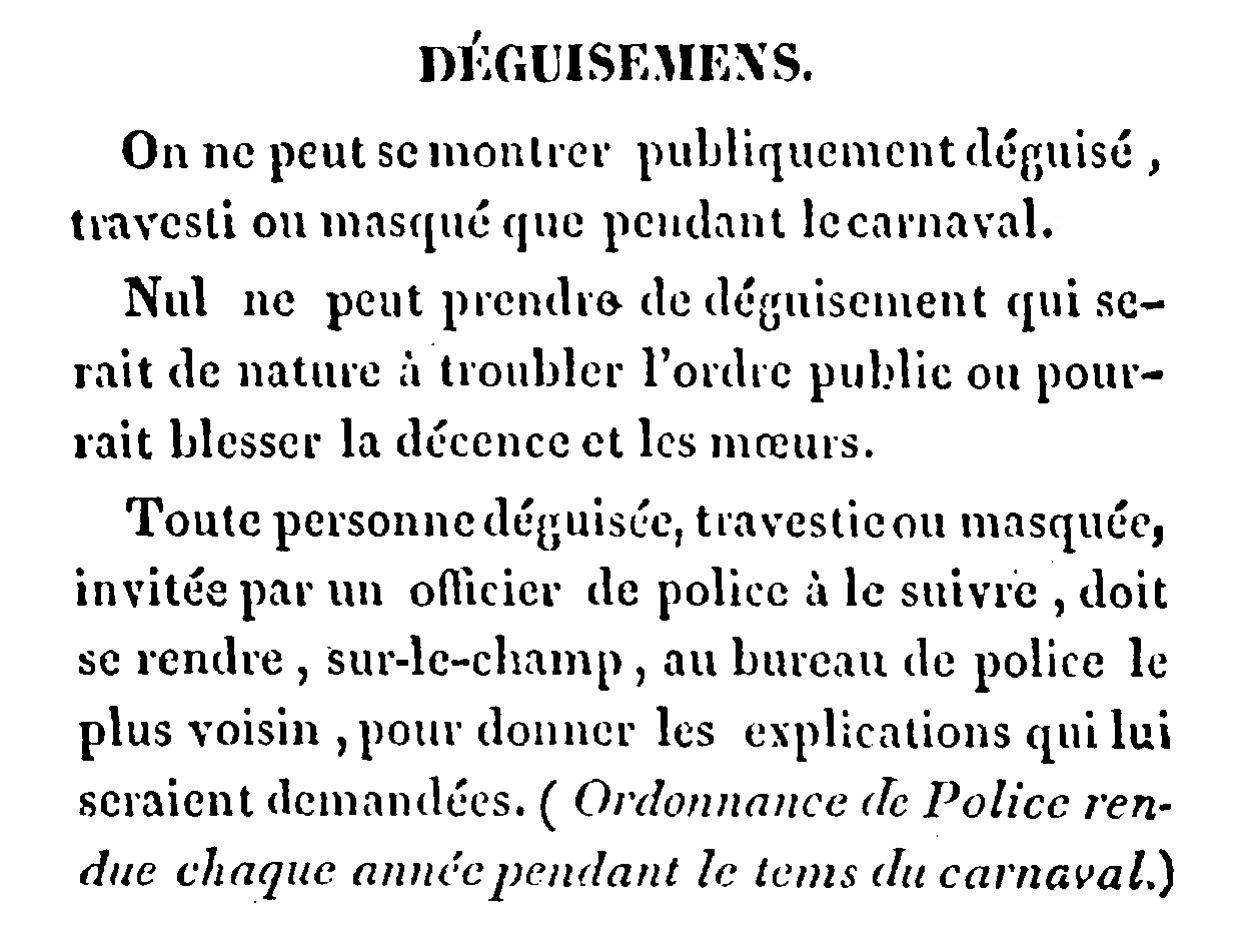 Réglementation des déguisements.